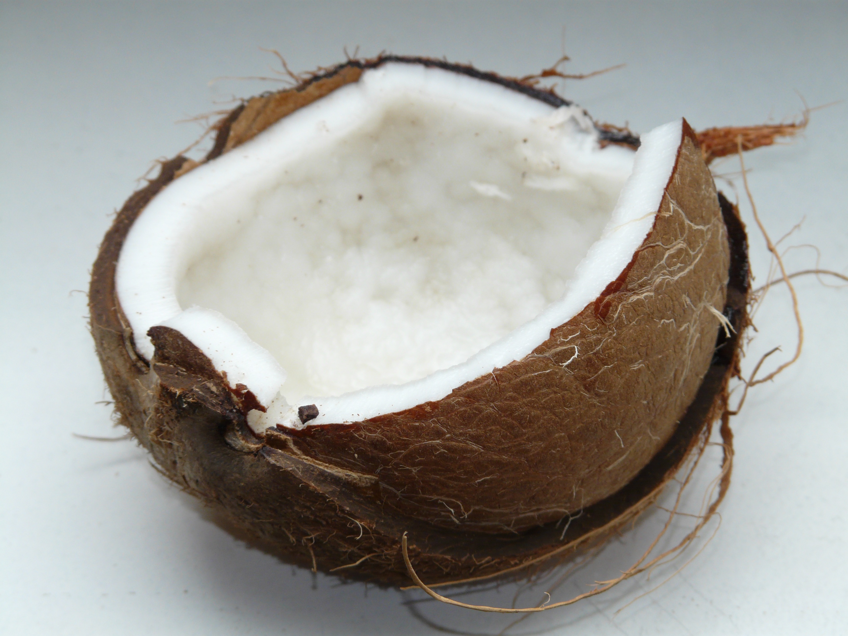 La noix de coco emprisonne de l'air dans sa graine pour qu'elle puisse flotter.